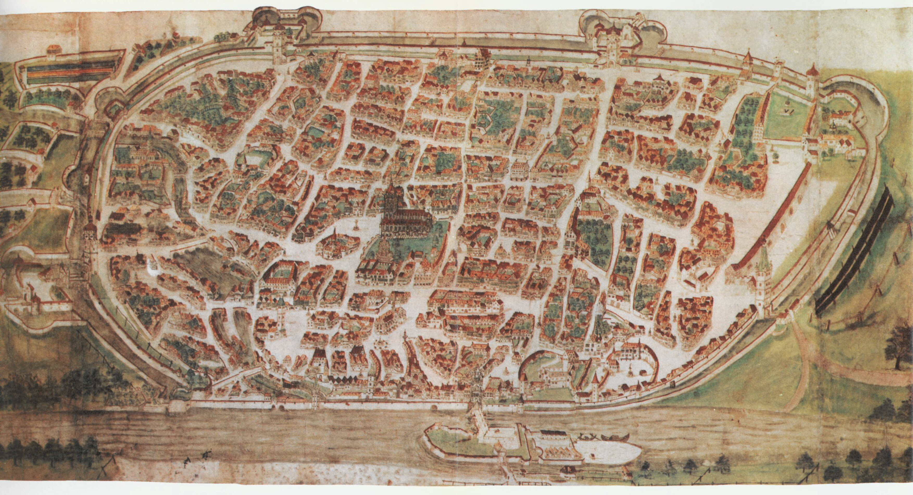 Vogelschauplan der Reichsstadt Ulm, kolorierte Tuschzeichnung, um 1597 Stadtarchiv Ulm, on display at Ulmer Museum